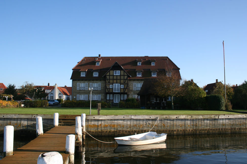 Das Mühlenhaus heute: Blick auf den von 1970 bis 1972 komplett sanierten Getreidespeicher. Die dazugehörige Mühle konnte nicht mehr saniert werden.